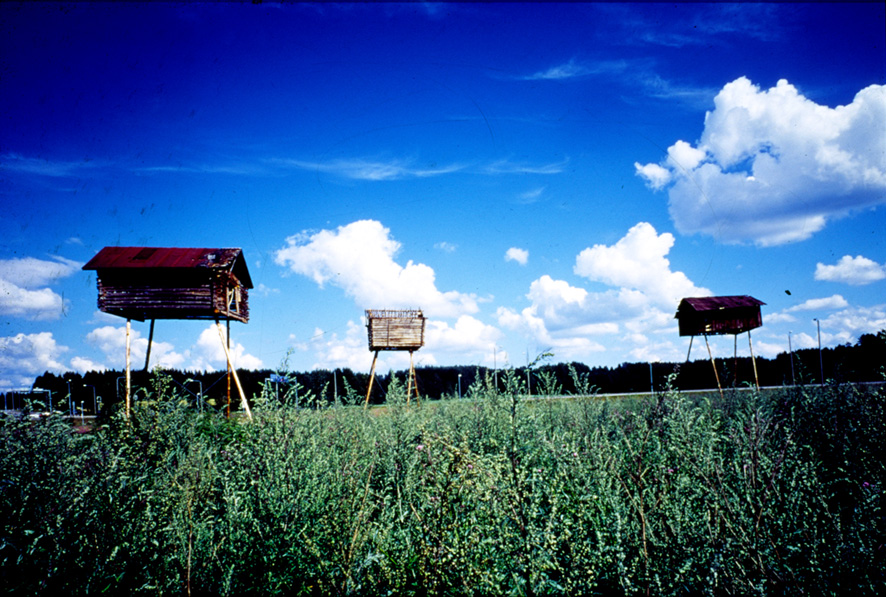 Casagrande & Rintala: Land(e)scape: Savonlinna Finland, 1999